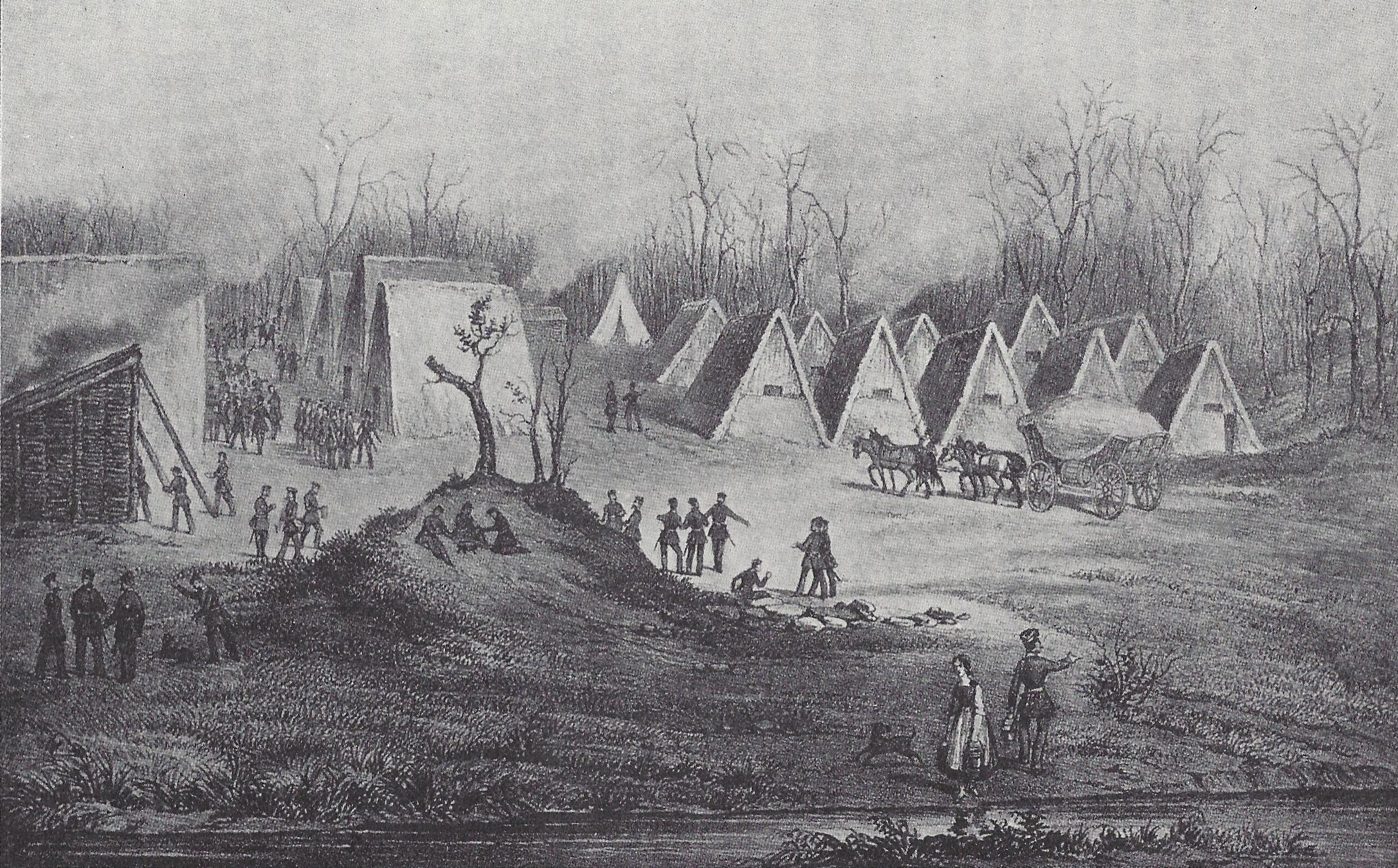 Zeltlager der schleswig-holsteinischen Truppen im Frühjahr 1848